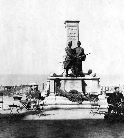 Het monument van De Bruyne & Lippens op de Zeedijk in Blankenberge vóór 1930.Henri De Bruyne; Jozef Lippens